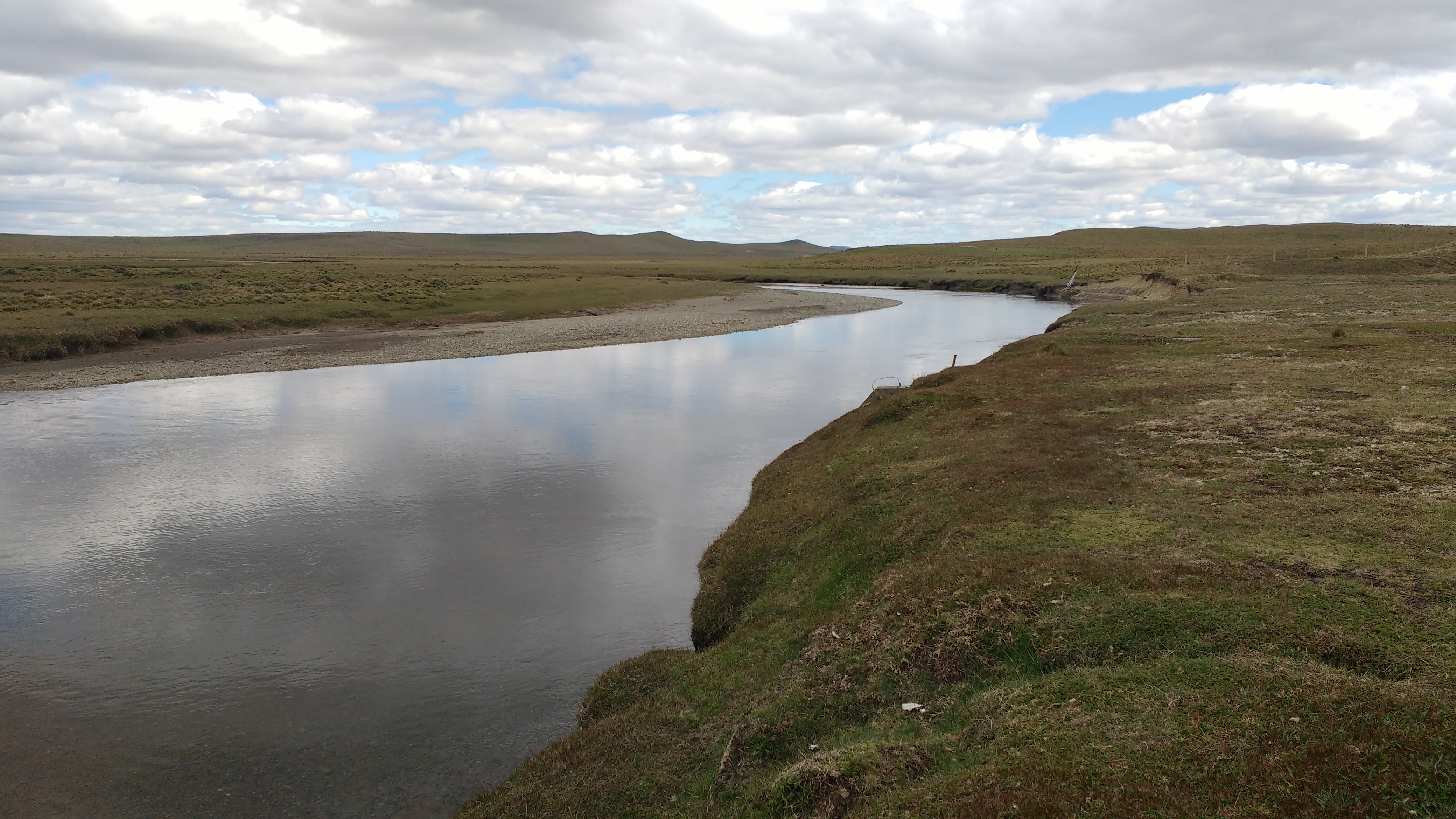 Imagen del Rio Chico